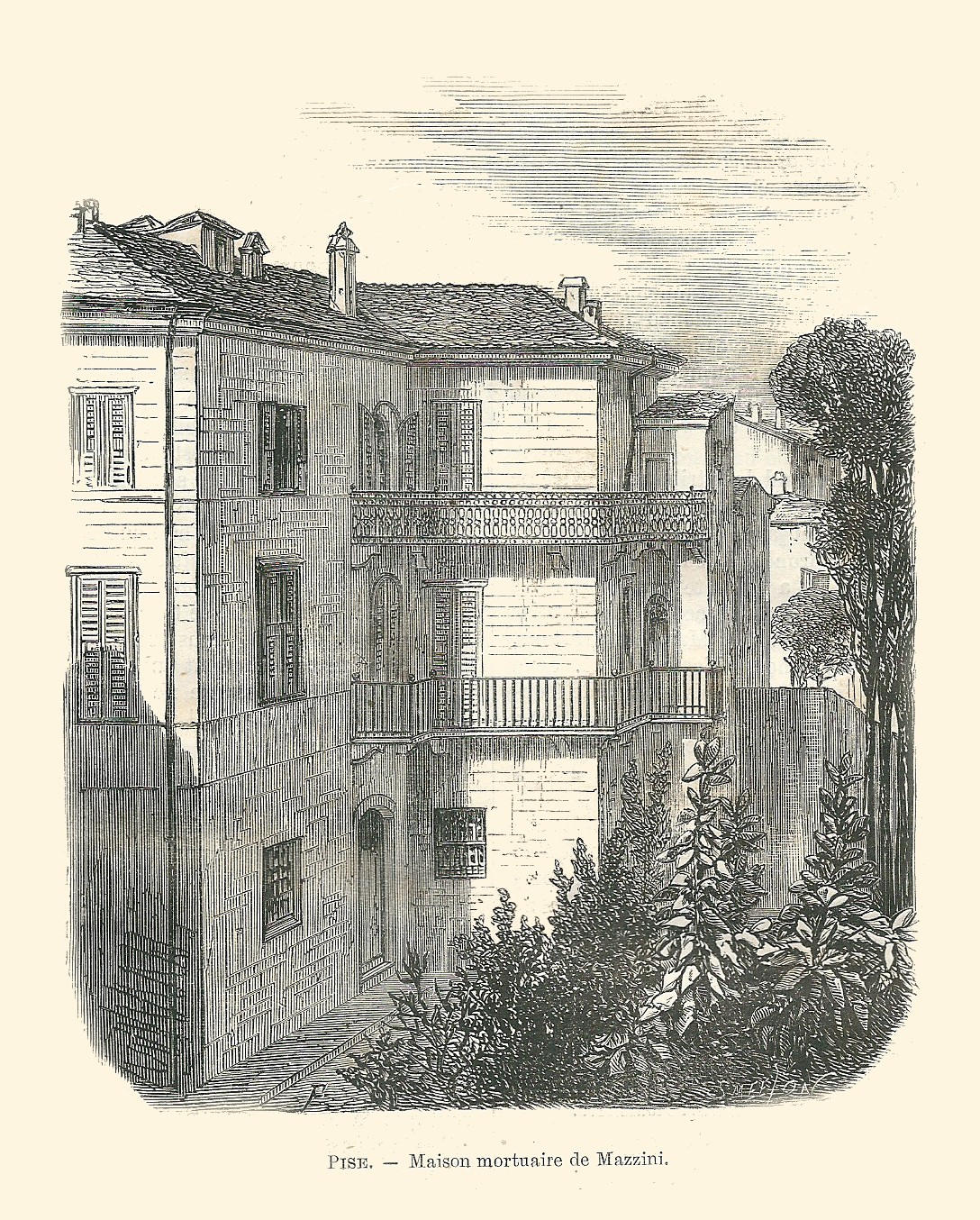 Maison mortuaire de Giuseppe Mazzini à Pise.